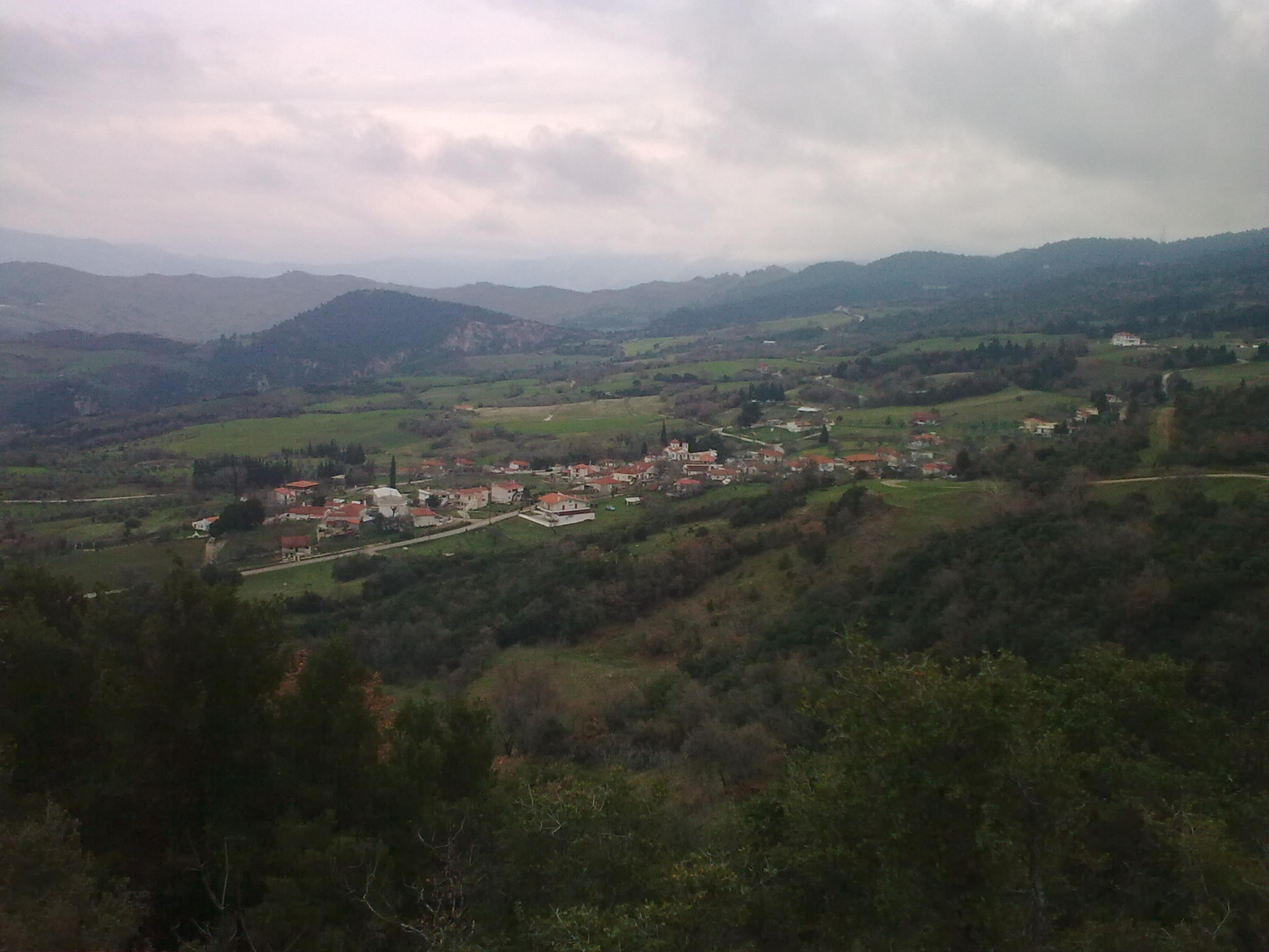 Ανάβρα Επ.λοκρίδος Ν.Φθιώτιδας